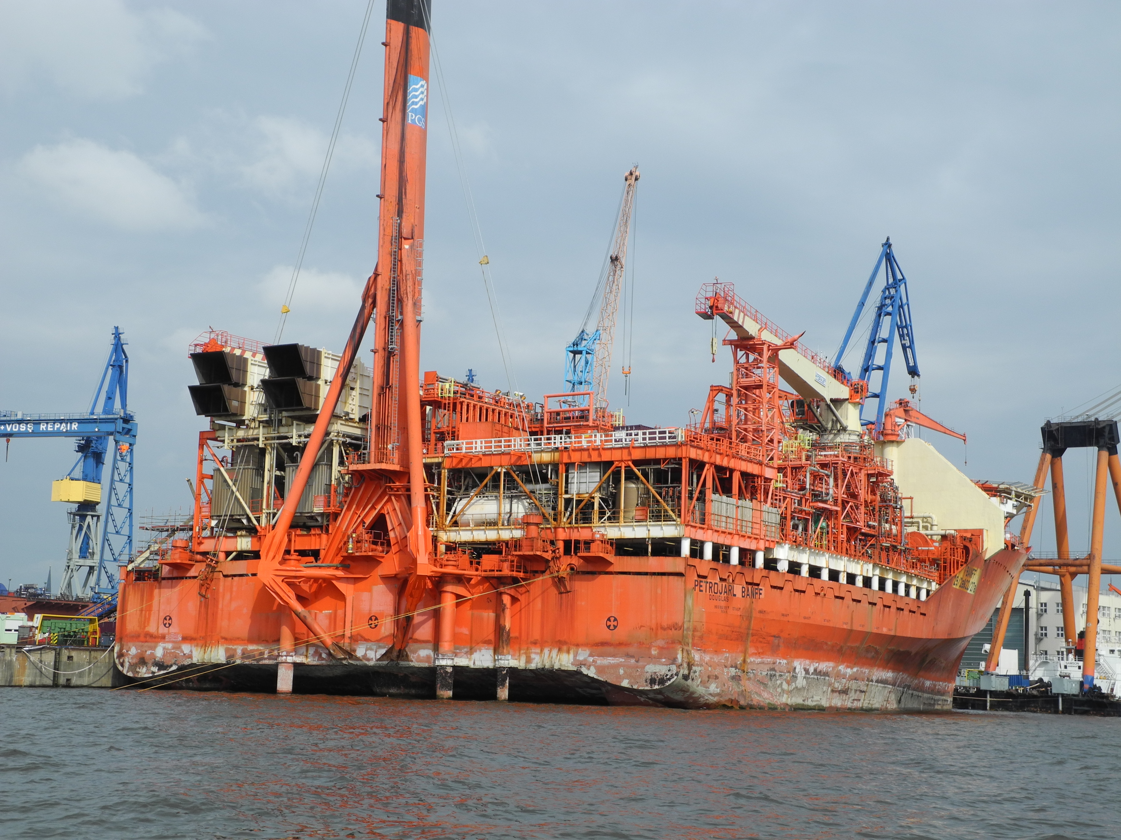 Hafen Hamburg